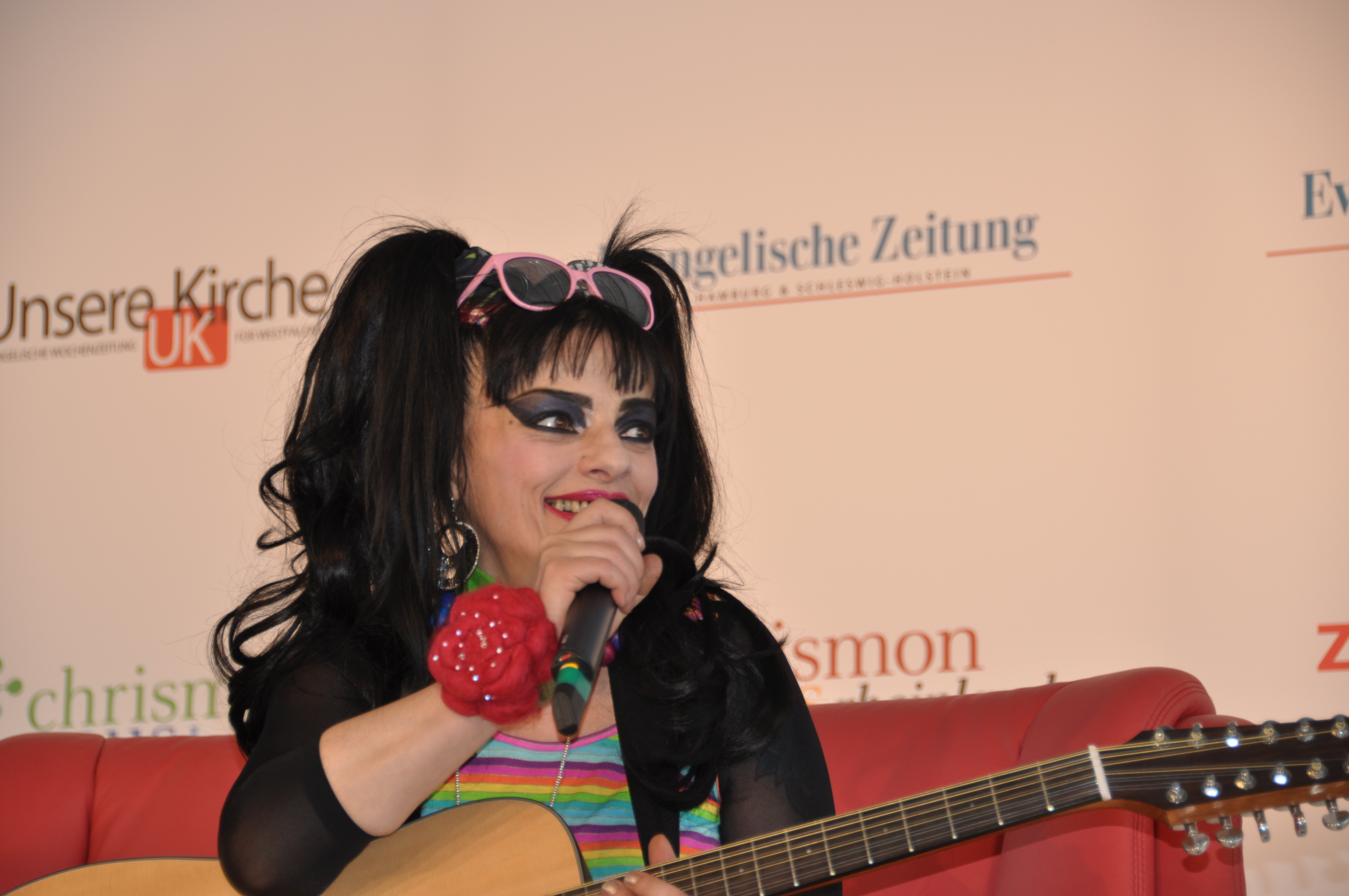 Nina Hagen, Sängerin, auf dem 33. Deutschen Evangelischen Kirchentag in Dresden, Juni 2011